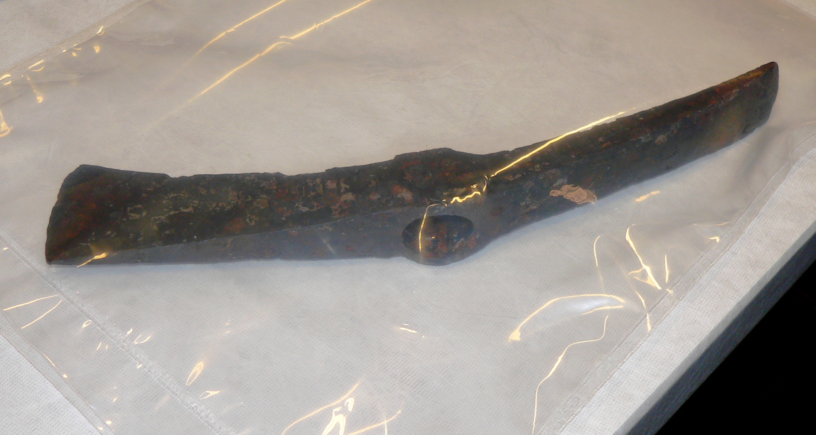 Dolabra konverviert in Folie mit Stickstoff, mit eingeschlagenen Schriftzeichen der Legio IIII Flavia Severiana Alexandriana (bzw. Legio IIII Flavia Felix), präsentiert bei Pressekonferenz, Fund Römisches Schlachtfeld bei Kalefeld, fotografiert im Niedersächsischen Landesamt für Denkmalpflege